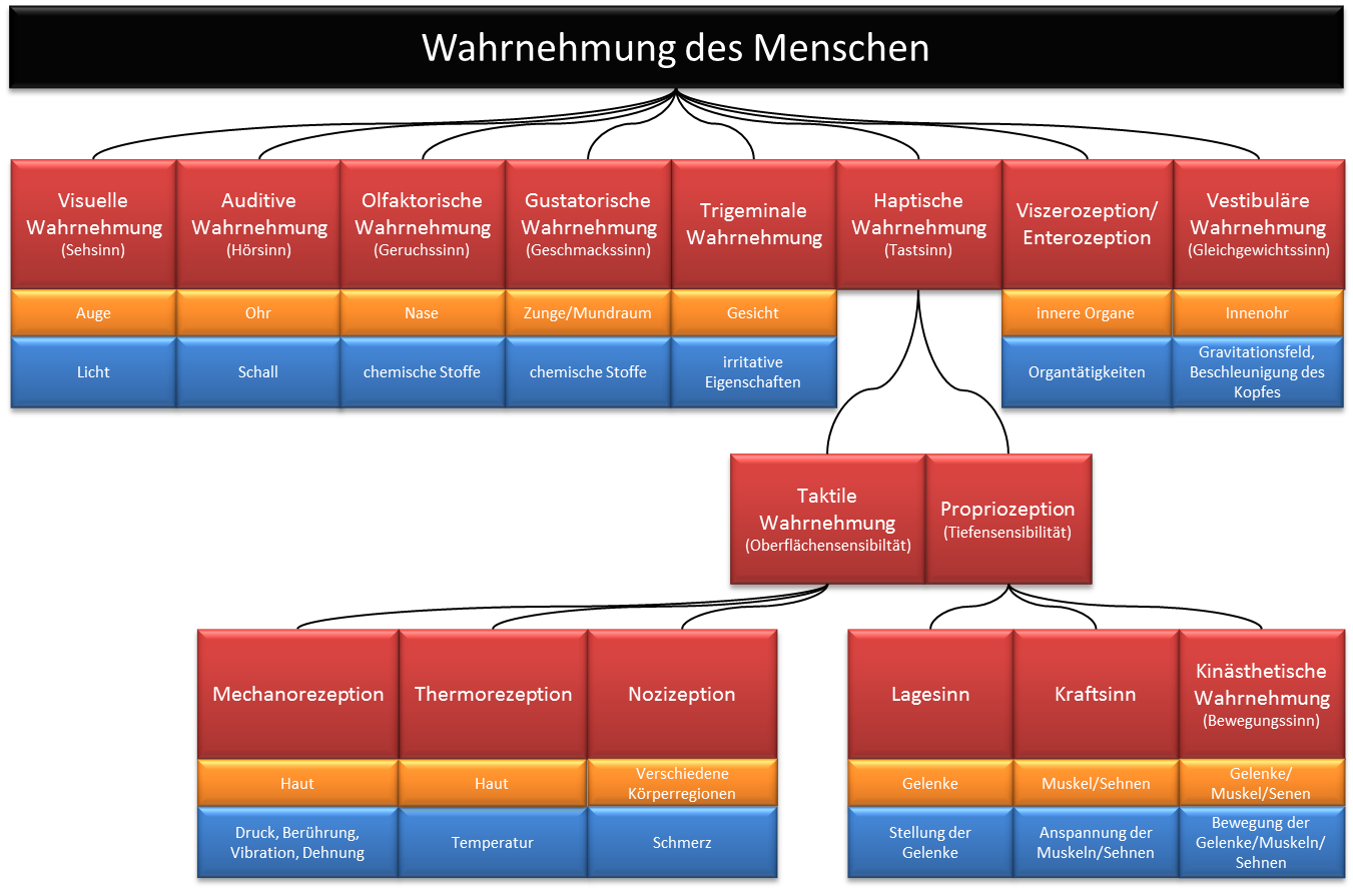 Übersicht über die Wahrnehmung und Sinne des Menschen